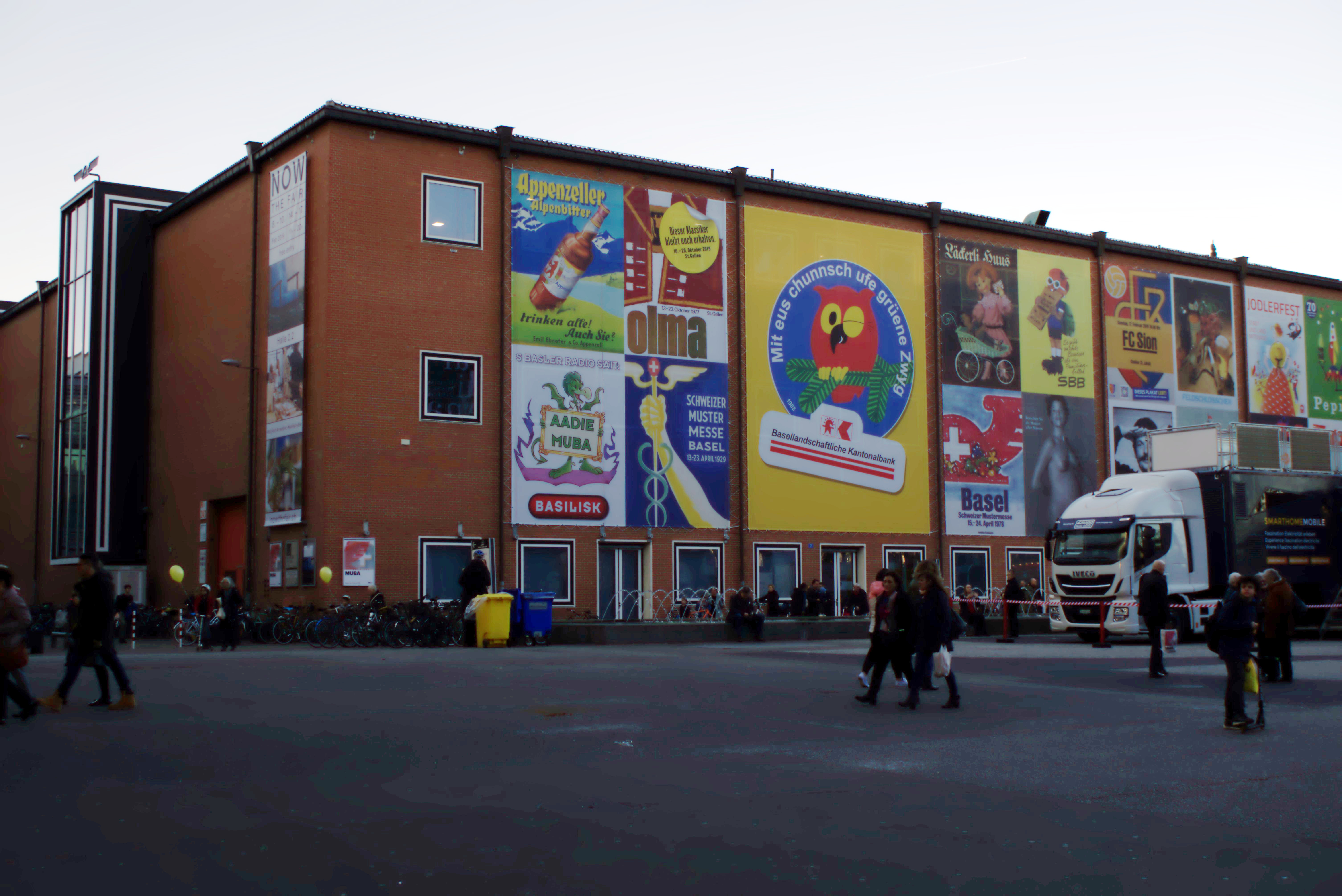 Außenansicht der Halle 2 während der muba 2019. Die muba ist die Mustermesse Basel, und sie fand 2019 zum letzten Mal statt. Unter den historischen Plakaten befinden sich drei für die muba selbst: 1929 (Fackel), 1978 (roter Helm), 2000 (nackte, schwangere Frau).